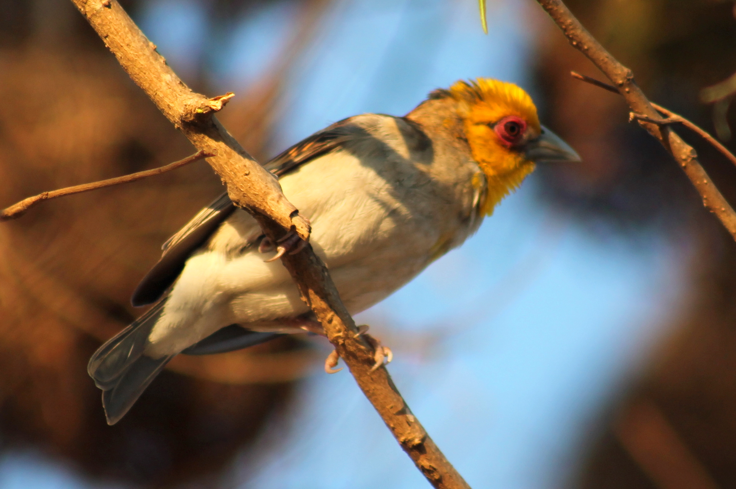 Sakalavawever